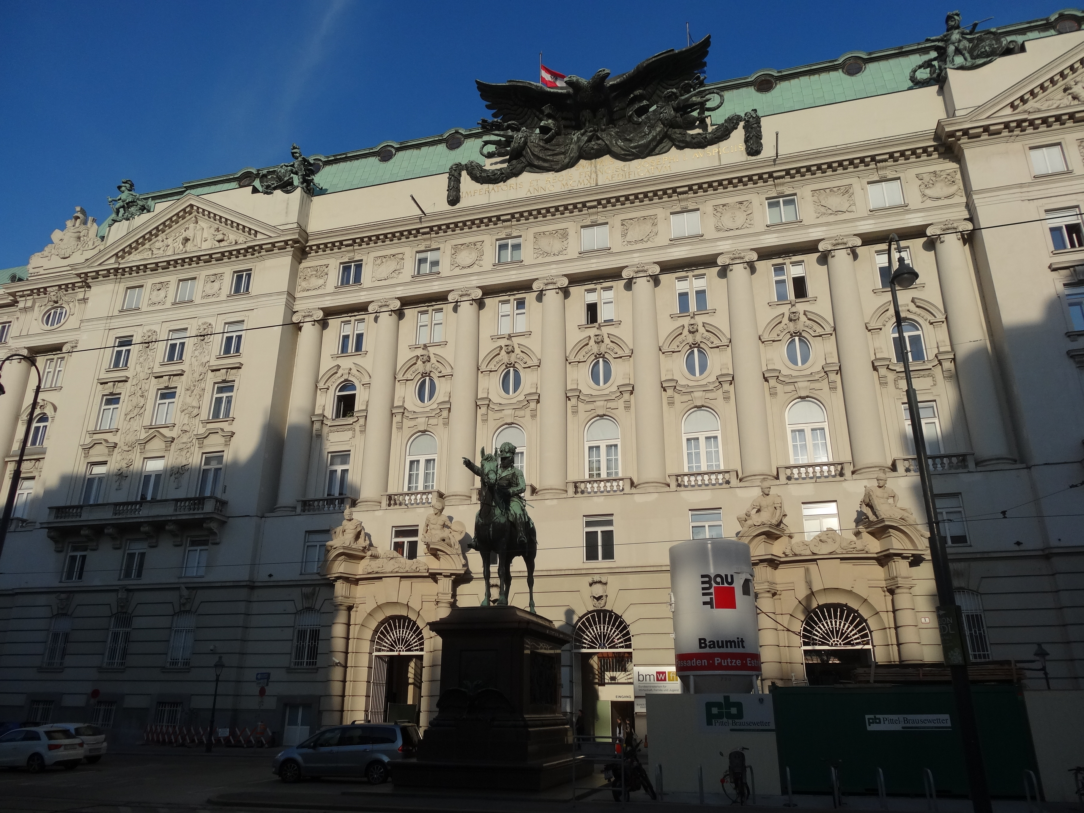 Viena (agost 2012)